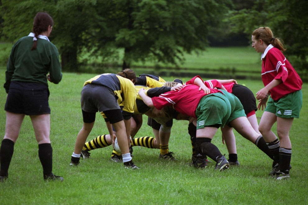 Auf diesem Bild sieht man ein Gedränge im 7-ner Frauen-Rugby. Das Bild habe ich selber mit meinr Digitalkamera geschossen, auf dem Bild sind Spielerinnen des Bocholter Wassersportvereins und des Gastvereins zu sehen, alle sind mit der Veröffentlichung des Bildes im Internet einverstanden.